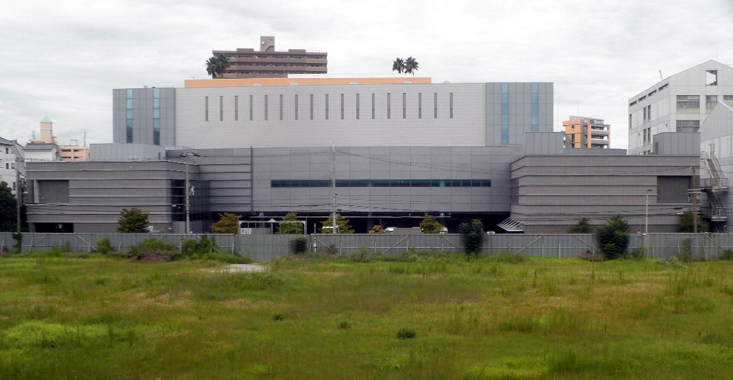 関大天六キャンパスから見た北斎場